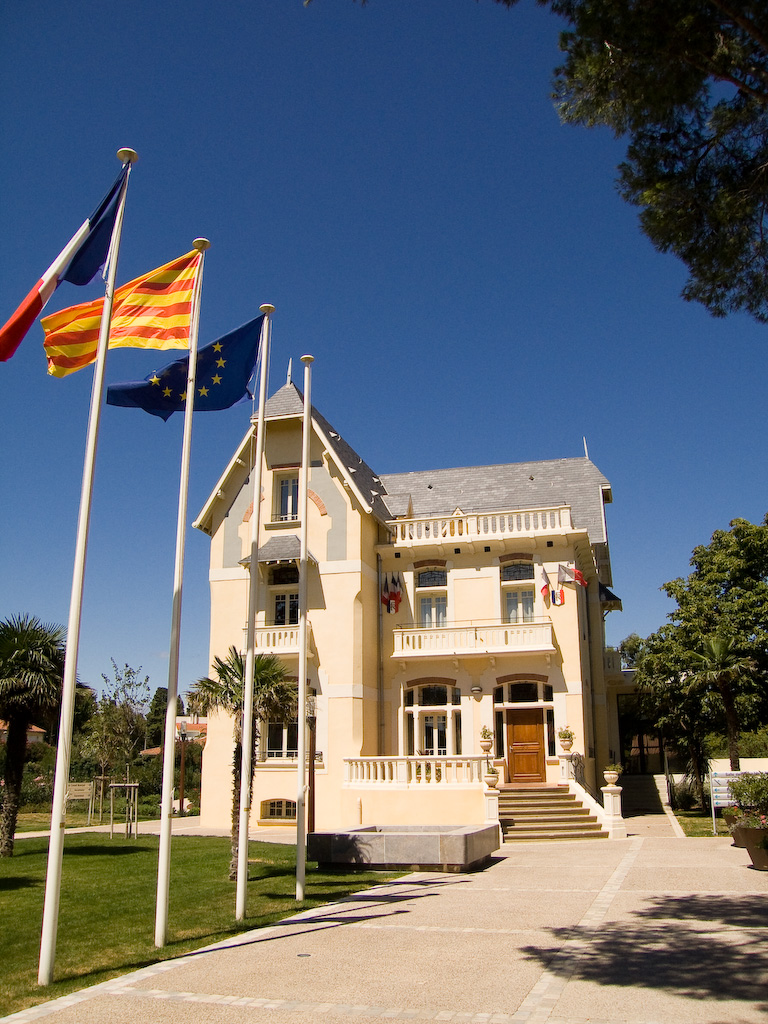 Mairie de Pezilla-La-Riviere (Pyrénées-Orientales, France)